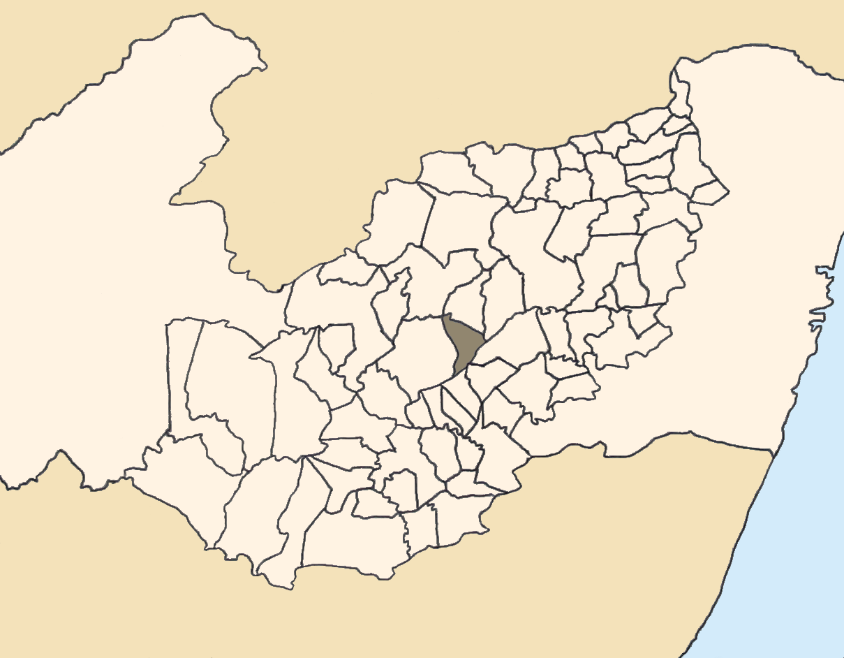 Mapa da mesorregião Agreste de Pernambuco (Brasil) subdivida em municípios. Em destaque, o município de Cachoeirinha. Map of the brazilian state of Pernambuco (mesorregião Agreste) showing the city of Cachoeirinha. Imagem tratada com o GIMP. Image made with GIMP.